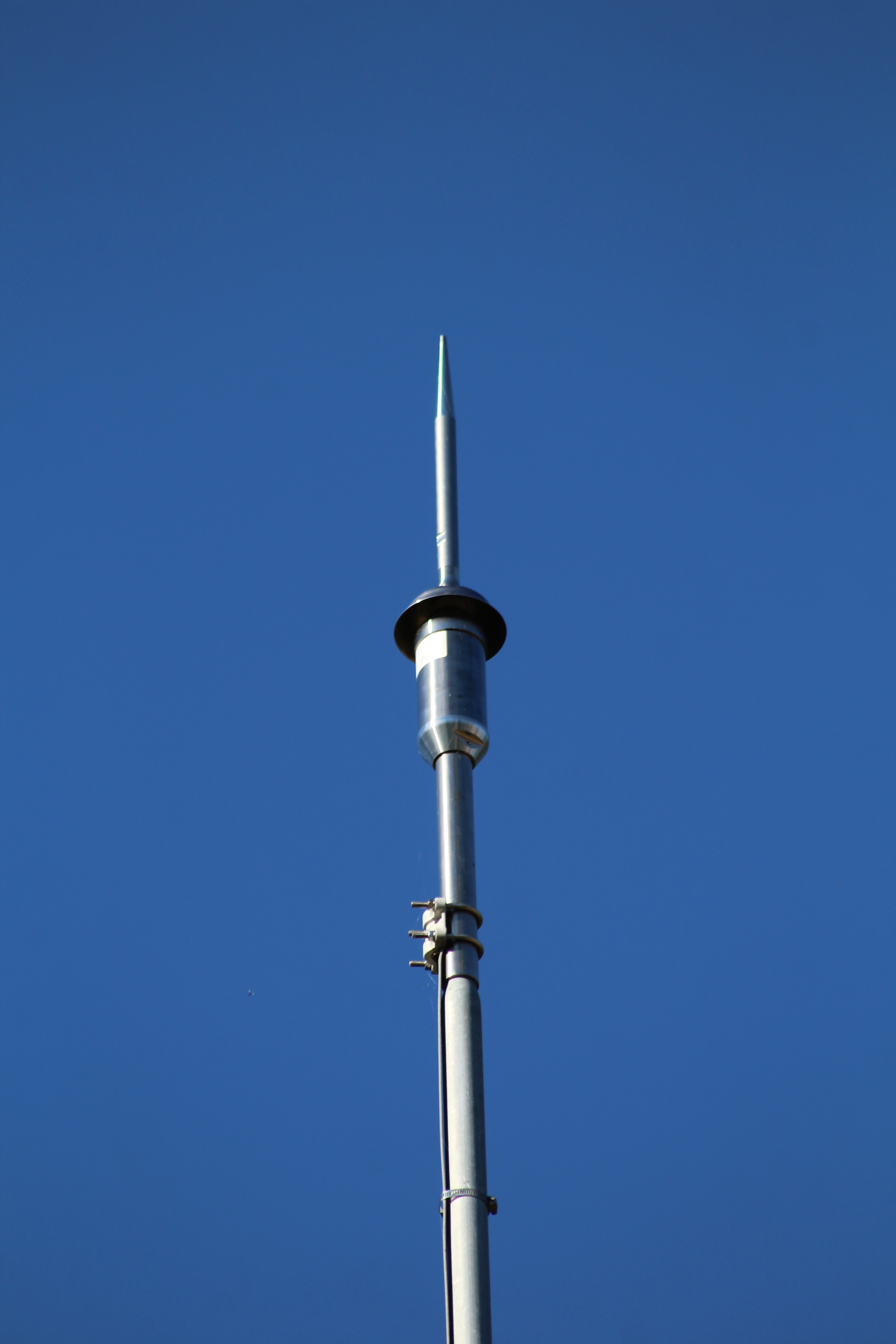 Paratonnerre mis en place près de la cheminée de la Ferme des Planons pour éviter que cette dernière ne reprenne la foudre, route de la Mulatière, Saint-Cyr-sur-Menthon.